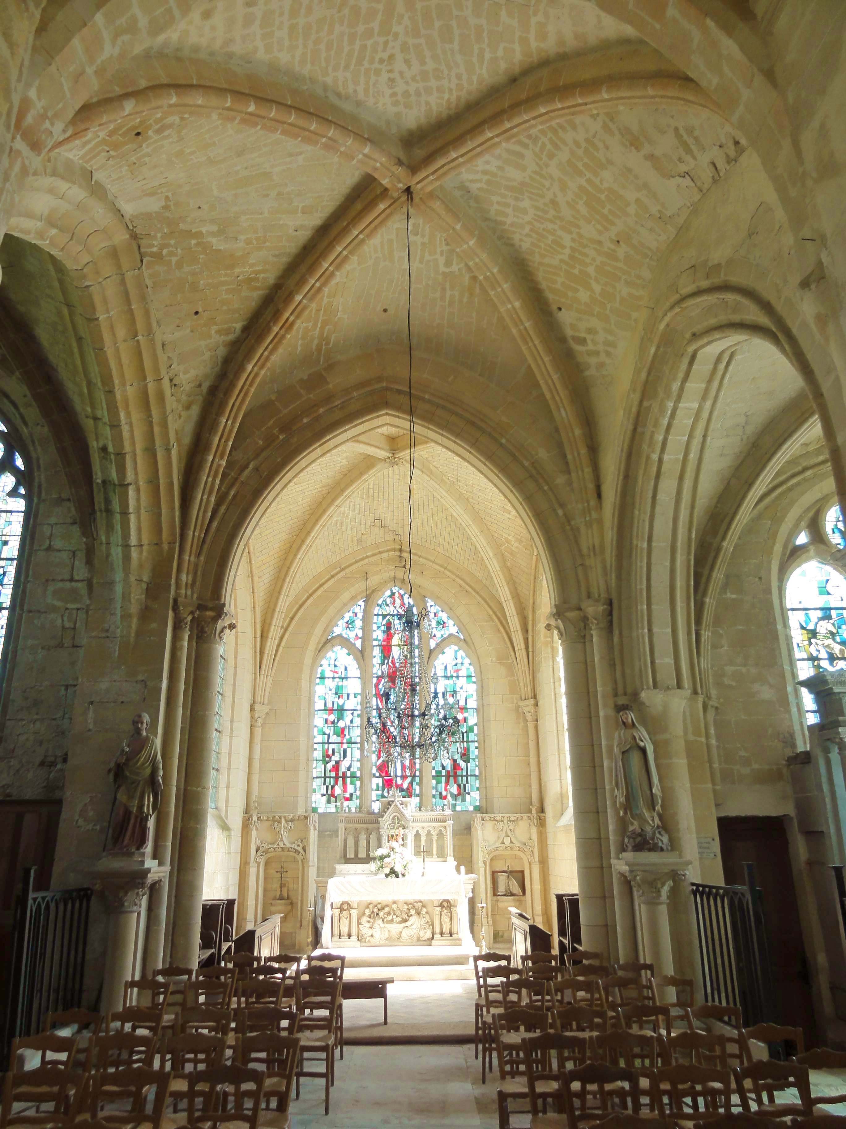 Intérieur de l'église - voir titre.